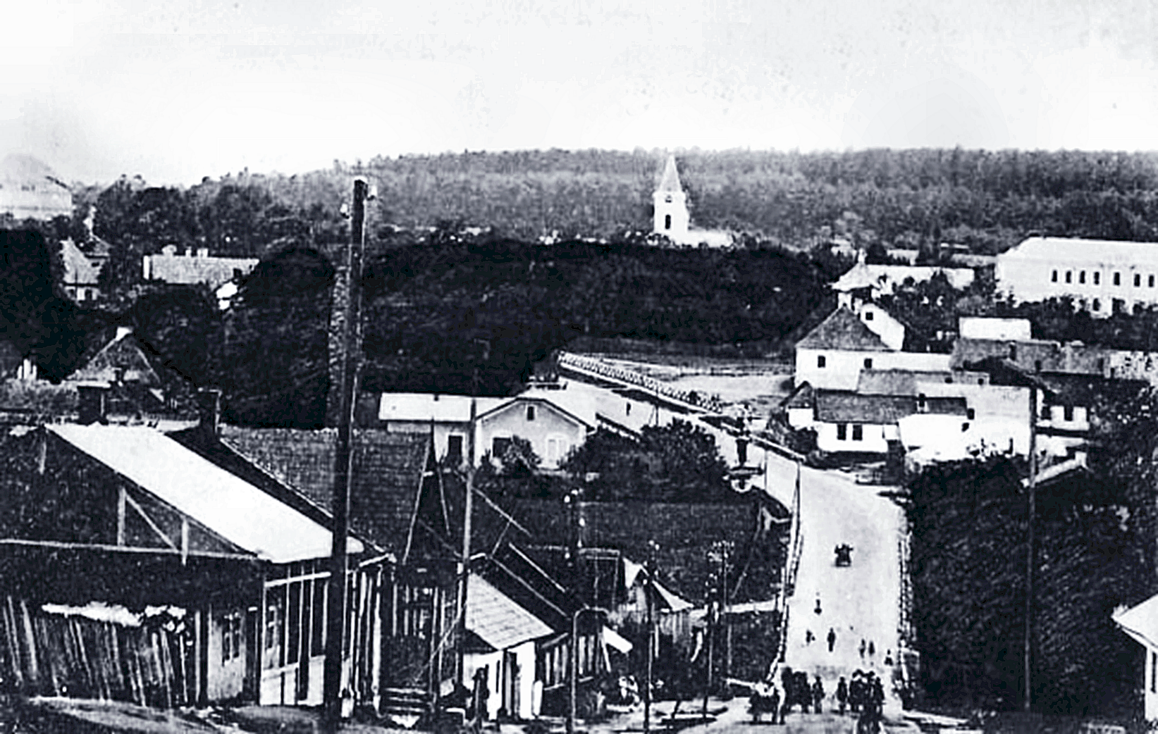 Cozmeni (Kotzmann, Kitsman) pe la 1900